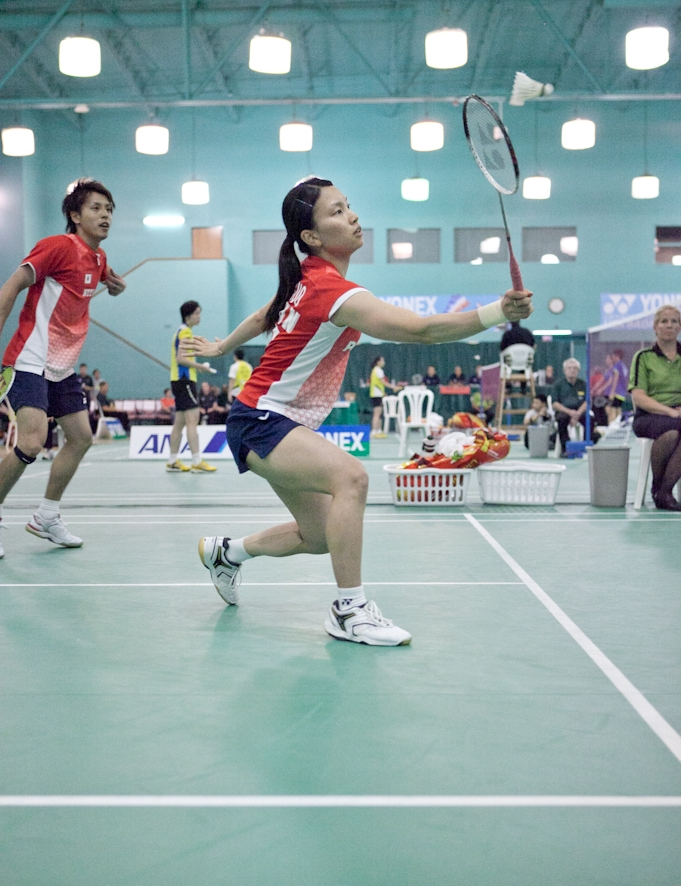 Shoji Sato and Shizuka Matsuo